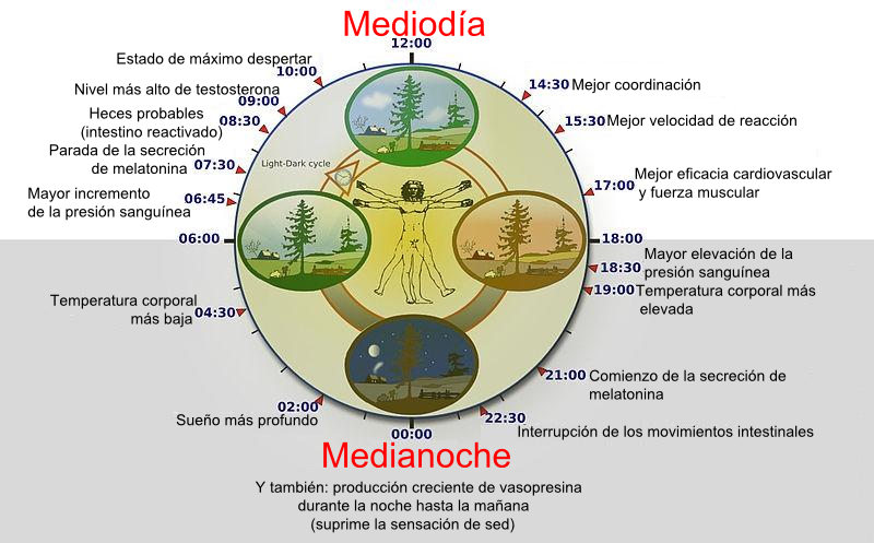 (d'après une autre image de Wikimédia commons : (GFDL). D'après un travail fait par YassineMrabet. sur la base de données extraites de "The Body Clock Guide to Better Health" by Michael Smolensky and Lynne Lamberg; Henry Holt and Company, Publishers (2000). vinettes paysages tirées de Open Clip Art Library (Ryan, Public domain). L'Homme de vitruve et l'horloge viennent de Image:P human body.svg (GNU licence) and Image:Nuvola apps clock.png, respectivement.